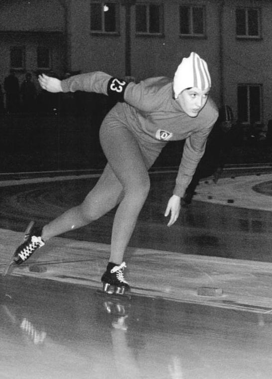 Monika Zernicek ADN-ZB Mittelstädt 22.12.73 Berlin: Monika Zernicek führt Nach dem ersten Wettkampftag der DDR-Mehrkampfmeisterschaften im Eisschnellauf auf der 400-m-Kunsteisbahn im Berliner Sportforum übernahm am 21.12.73 Monika Zernicek (SC Dynamo Berlin-Foto von einem früheren Wettkampf) nach zwei Strecken (500 und 1500 m) mit 95,747 Punkten die Führung. Abgebildete Personen: Zernicek, Monika: Eisschnelläuferin, SC Dynamo Berlin, Olympiade 1976, DDR